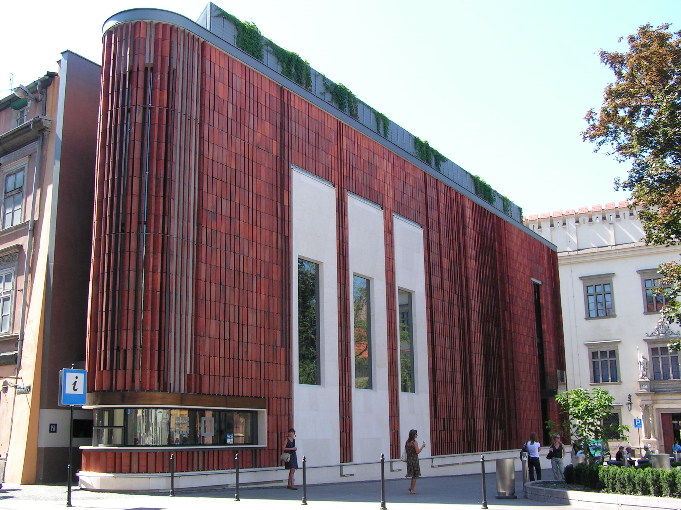 Pawilon Wyspiański 2000, Kraków